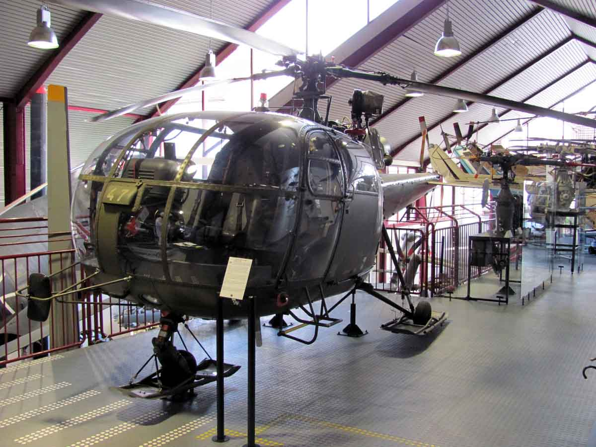 Aérospatiale SA-316B Alouette III, Kennzeichen V-247, ehemals Schweizer Luftwaffe, aufgenommen im Hubschraubermuseum Bückeburg